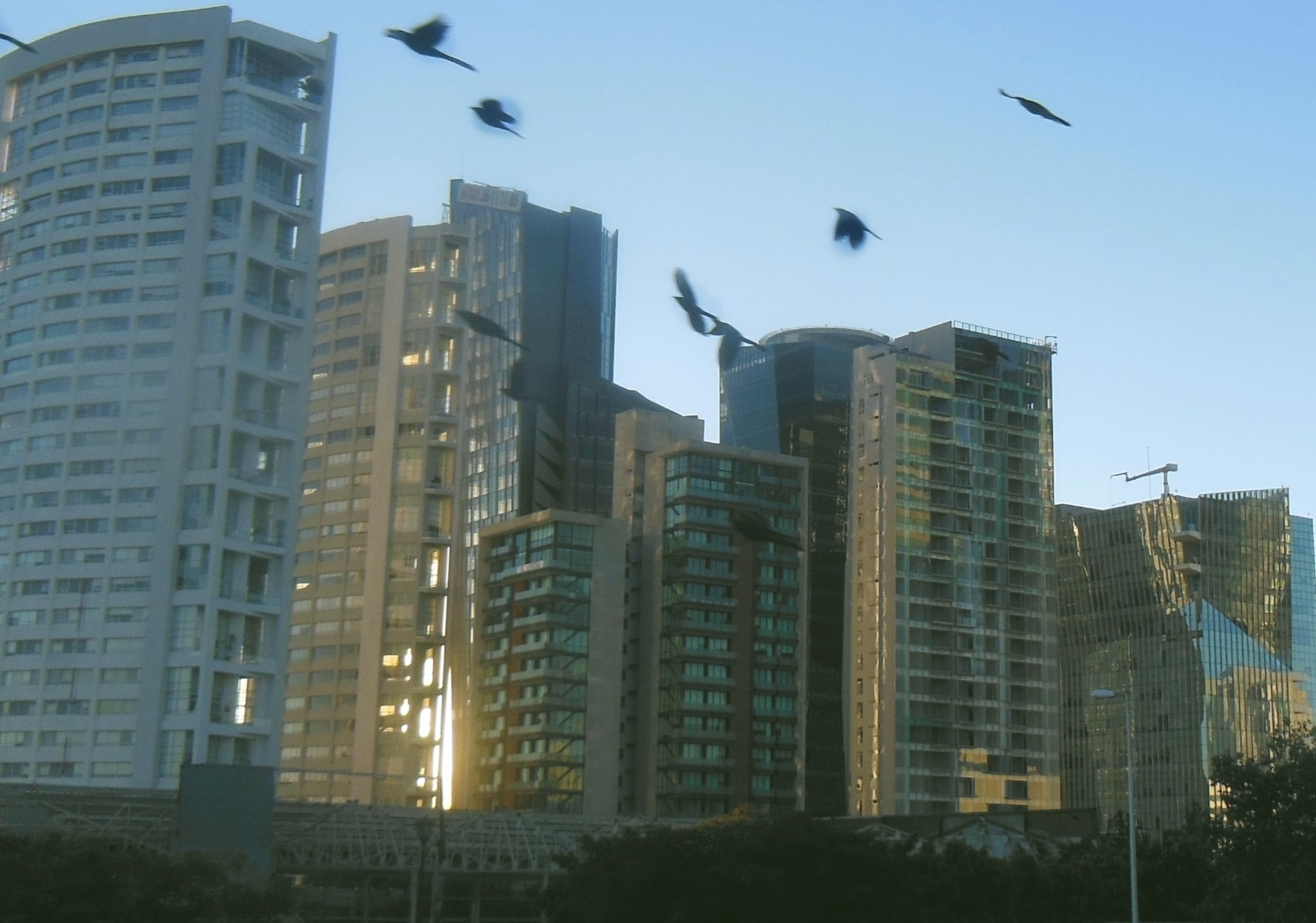 Puerta de Hierro ZM Guadalajara México